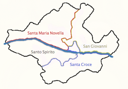 Quartieri storici di Firenze Lavoro originale